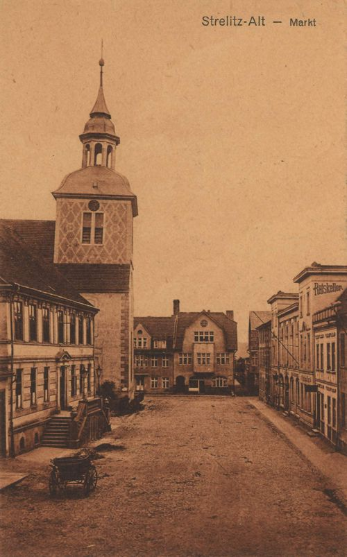 Strelitz-Alt — Markt